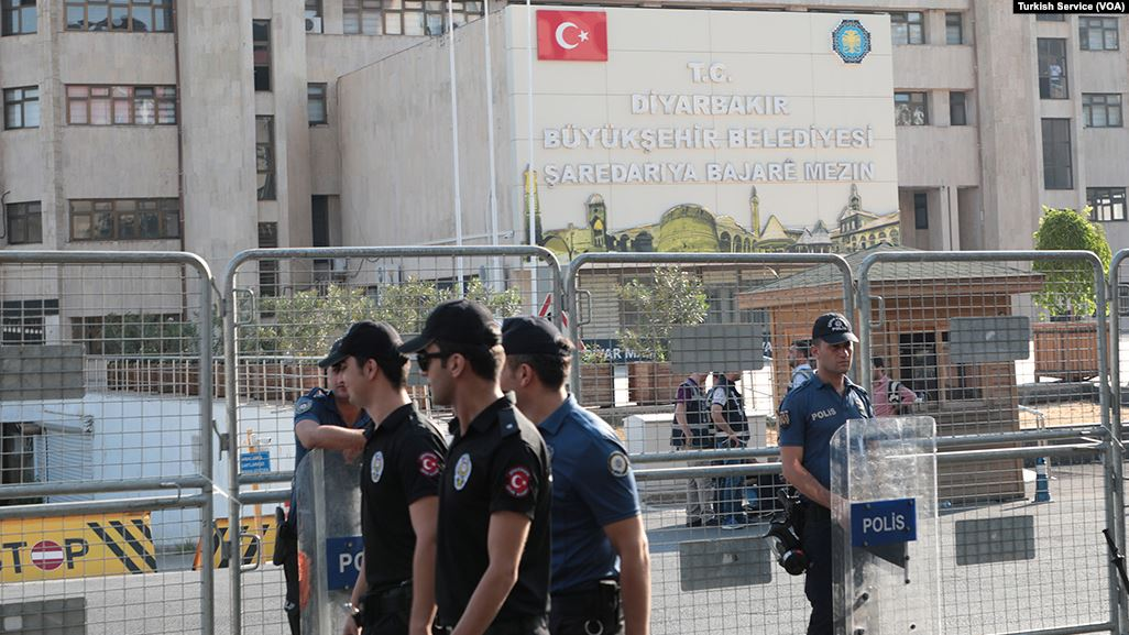 Kayyım kararı sonrası Diyarbakır Büyükşehir Belediye Başkanlığı binası çevresi